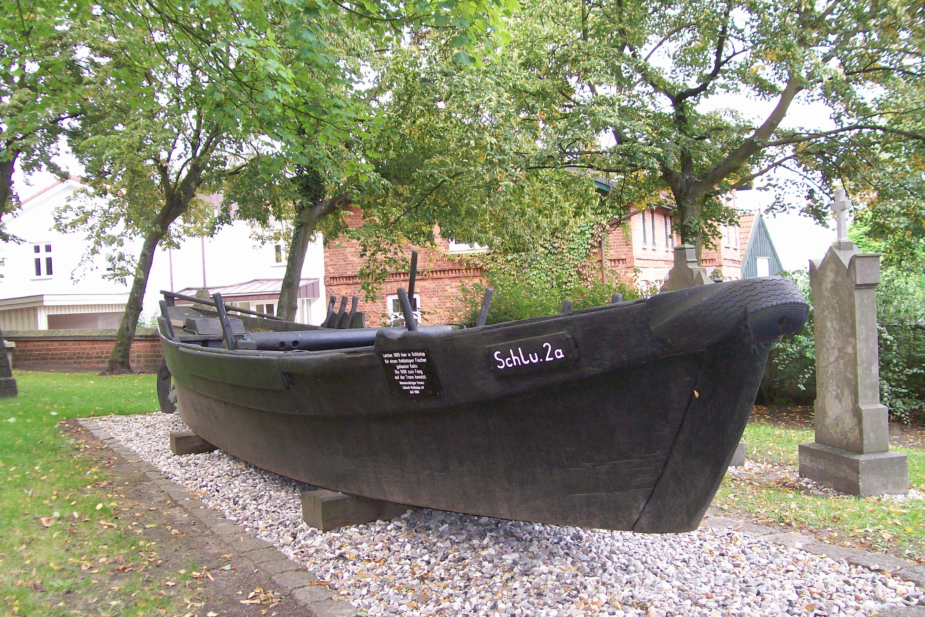 Schlutuper Fischerkahn, 1965 als letztes Fischerboot in Schlutup gebaut. Mit ihm wurde bis 1986 auf der Trave gefischt, jetzt auf dem Kirchhof von St. Andreas Schlutup aufgestellt